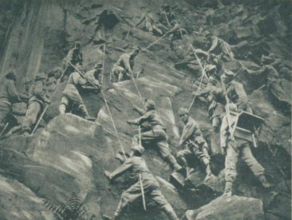 Avstro-ogrski alpinci namerjajo doseči neki doslej nedostopni vrh